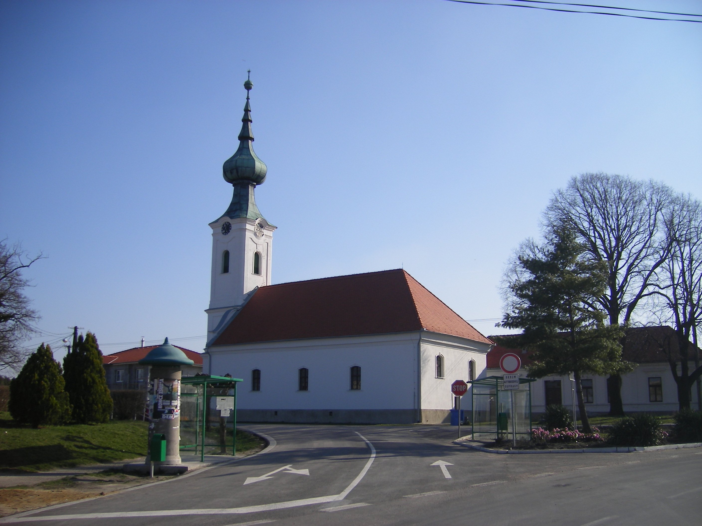 Nemesócsa református temploma